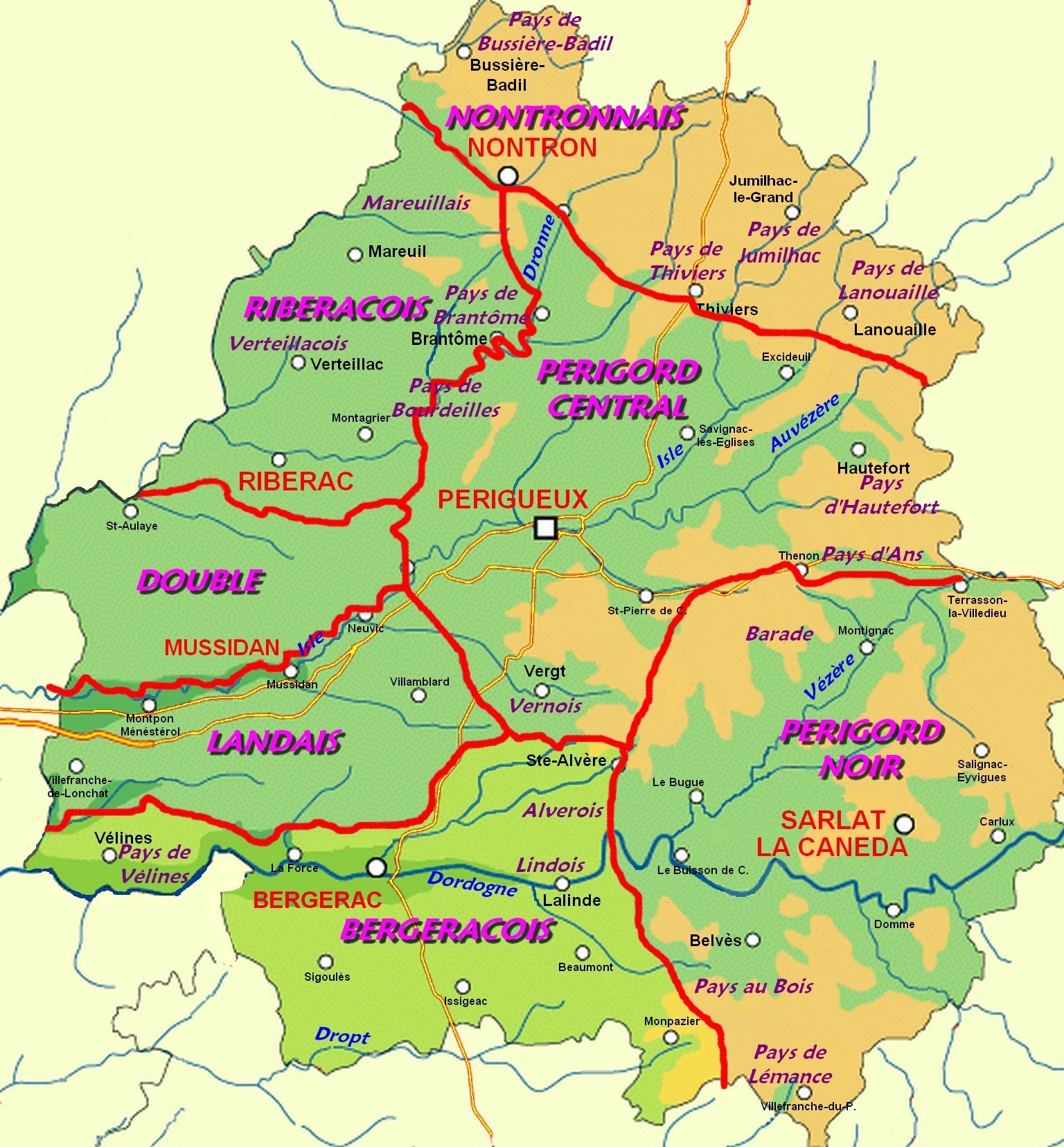 Localisation du Bergeracois sur la carte des pays traditionnels du Périgord.